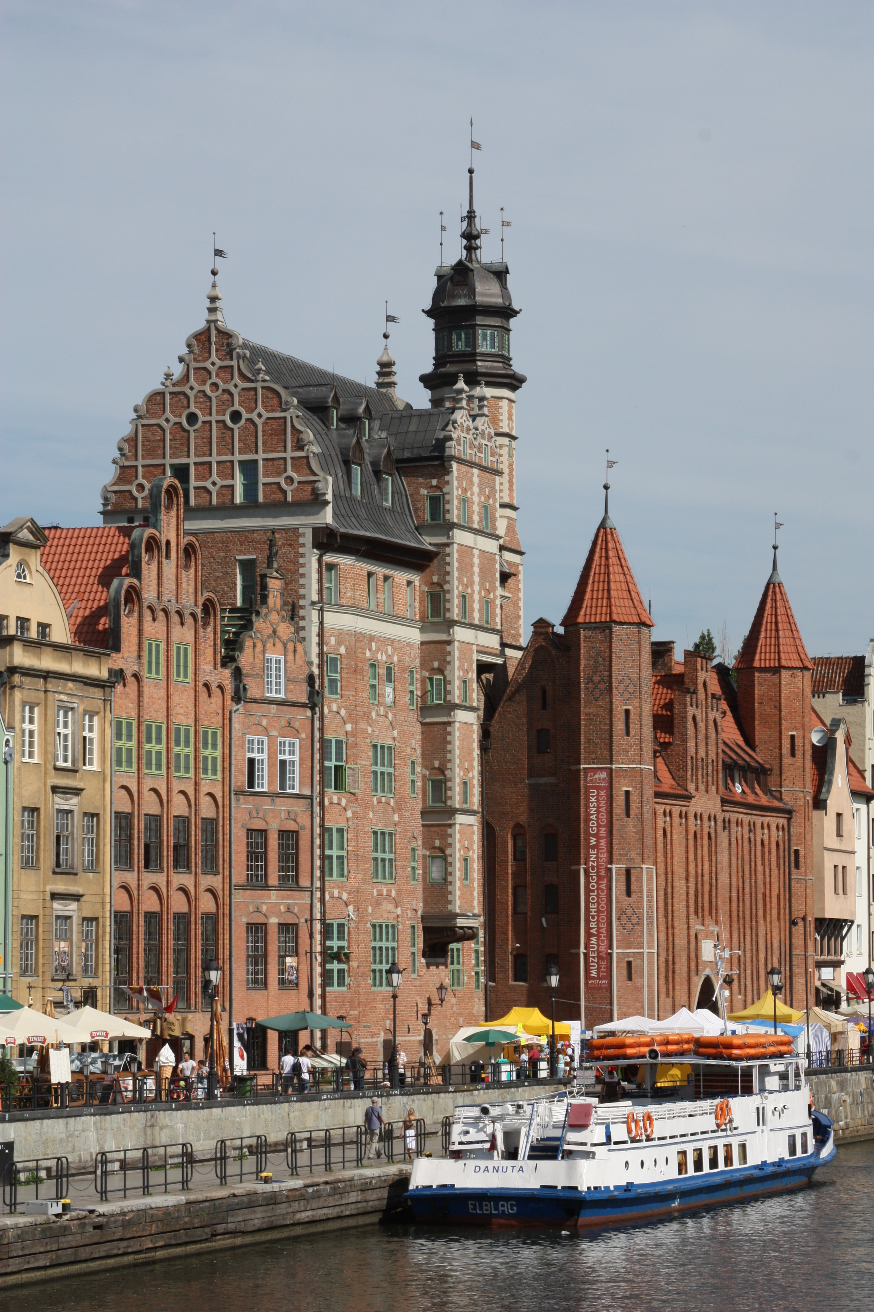 Gdańsk; Touristenfotos 2009